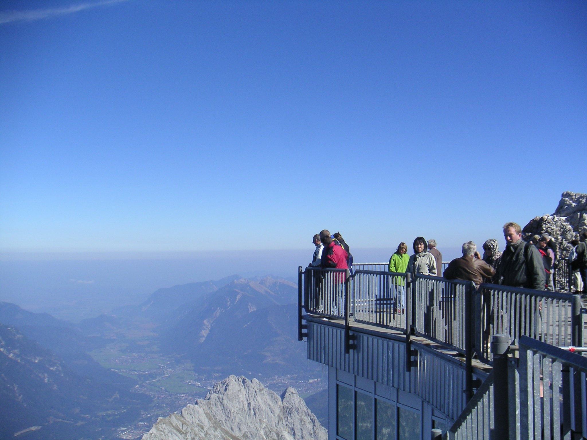 2003年9月30日 本人撮影 ガルミッシュ